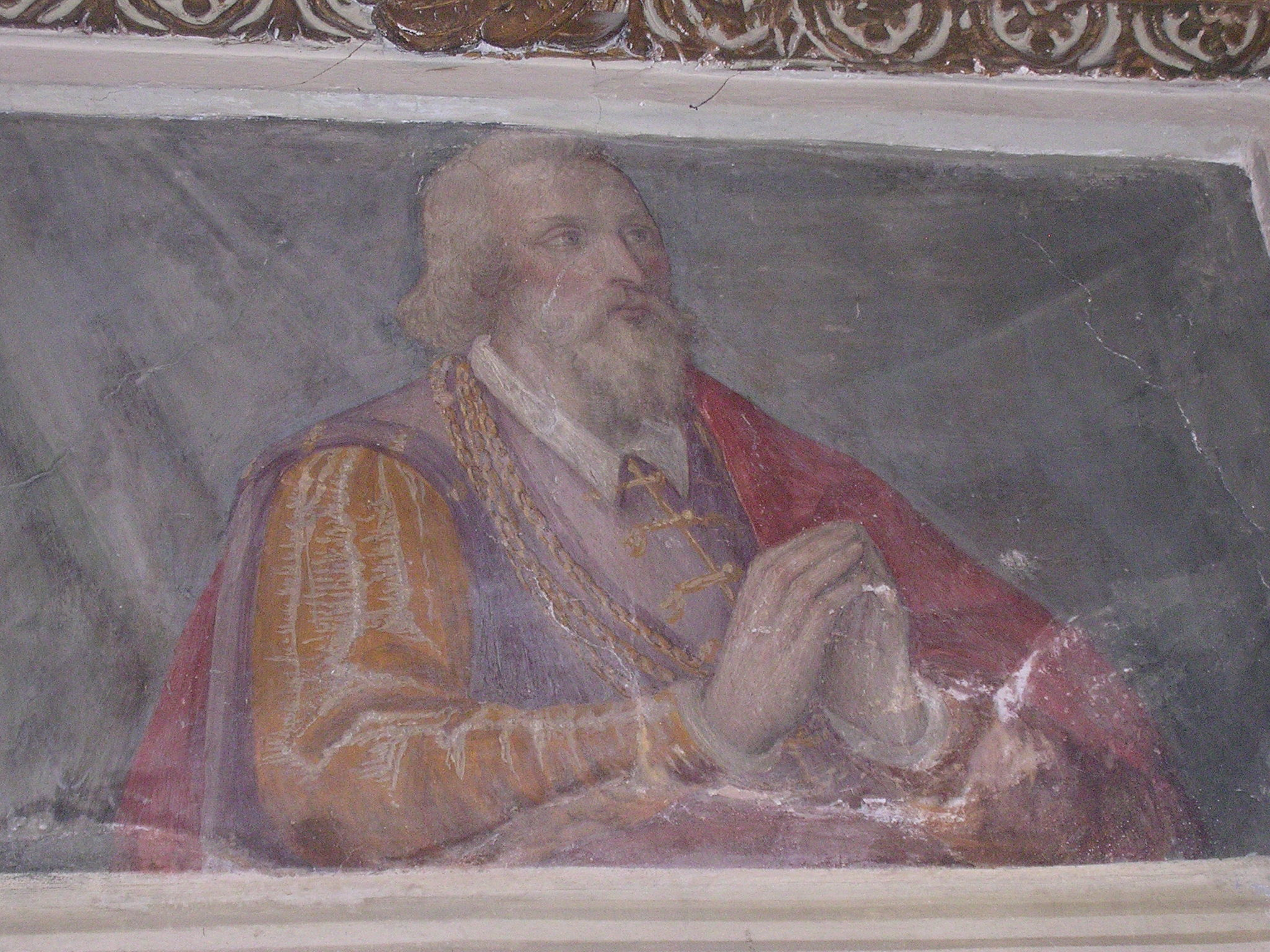 "Aleramo" dipinto del Guglielmo Caccia detto "il Moncalvo" XVII secolo, conservato presso la chiesa di Grazzano Badoglio (Asti)